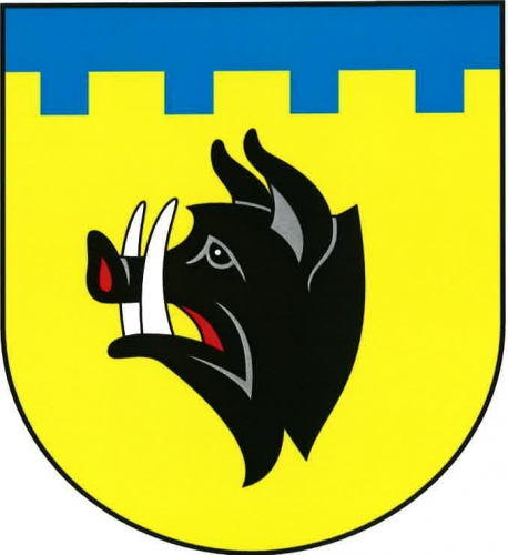 Běleč(TA), znak. Ve zlatém štítě pod modrou cimbuřovou hlavou černá kančí hlava se stříbrnými kly.